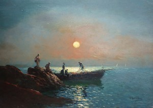 Huile sur panneau signée en bas à droite - 25 x 40 cm